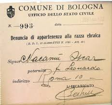 Modulo di denuncia di appartenenza alla razza ebraica